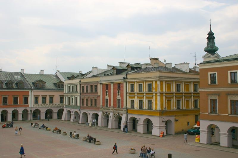 Zamosc (Poland)